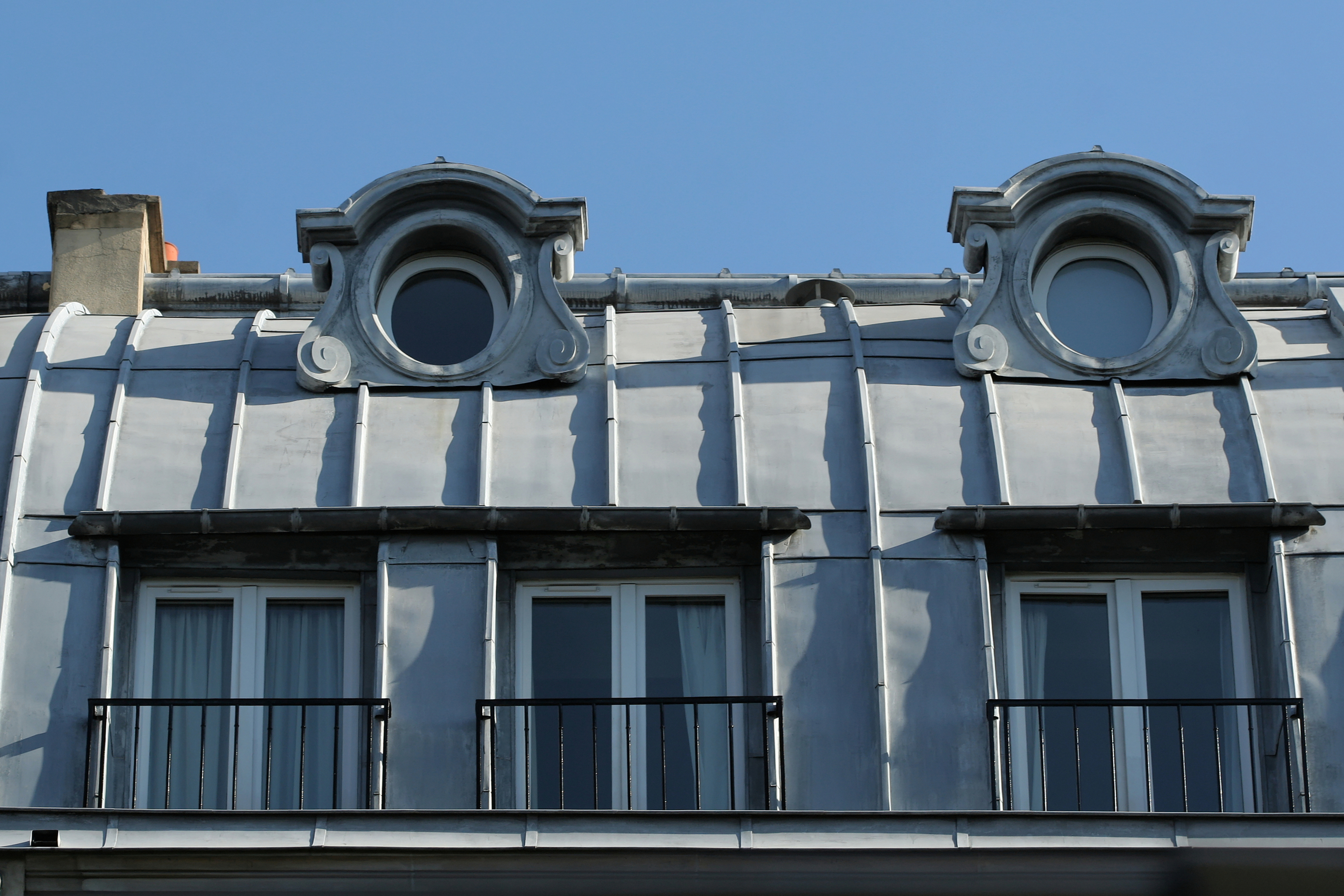 1 boulevard Saint-Michel, Paris. Toit (zinc à tasseaux), lucarnes rentrantes et œils-de-bœuf sur le versant à ailerons.